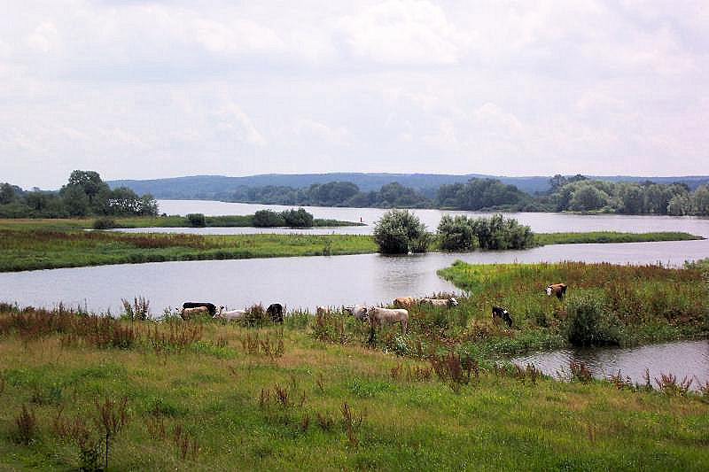 Elbauen bei Darchau, Amt Neuhaus